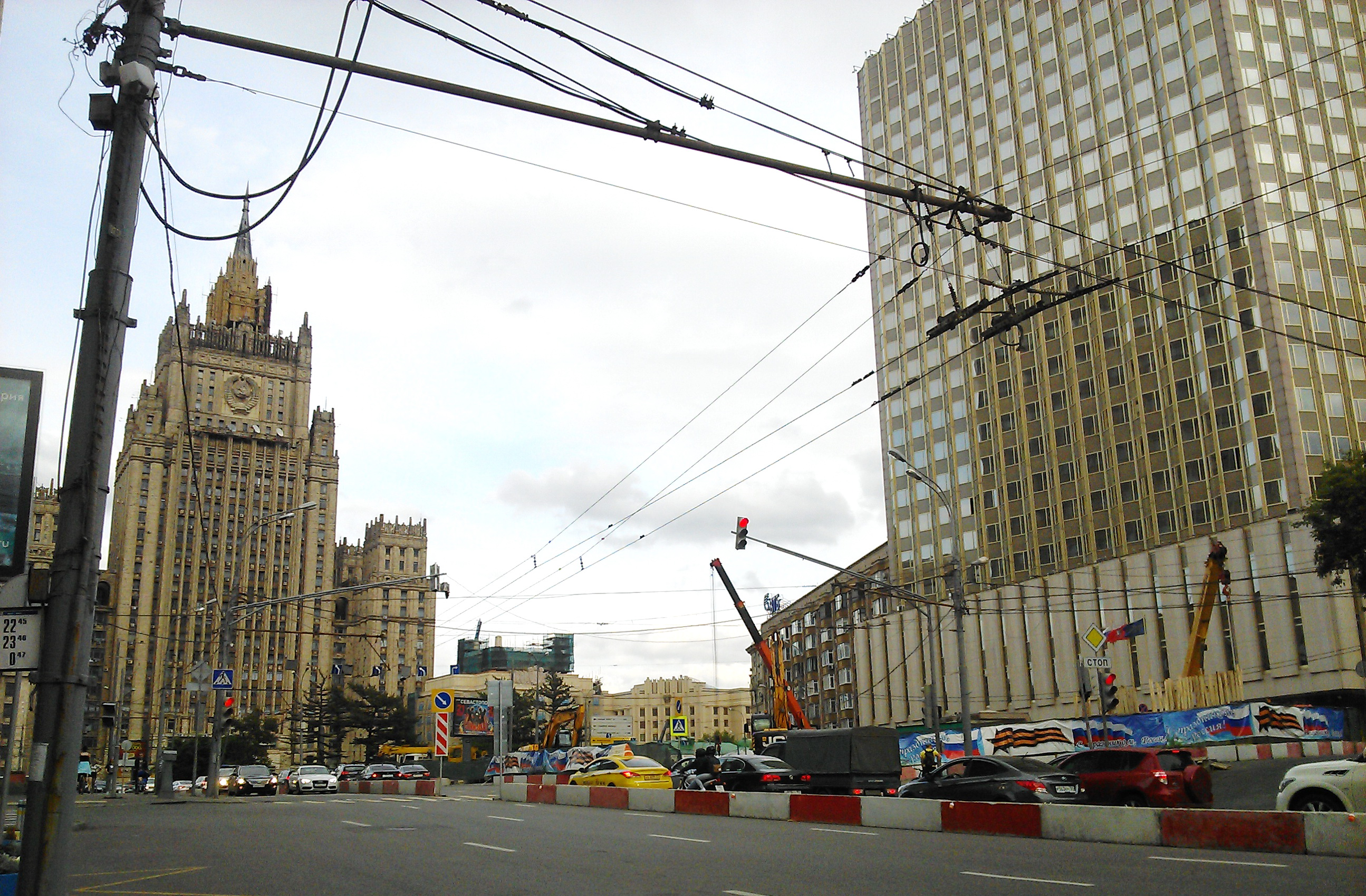 Смоленская площадь